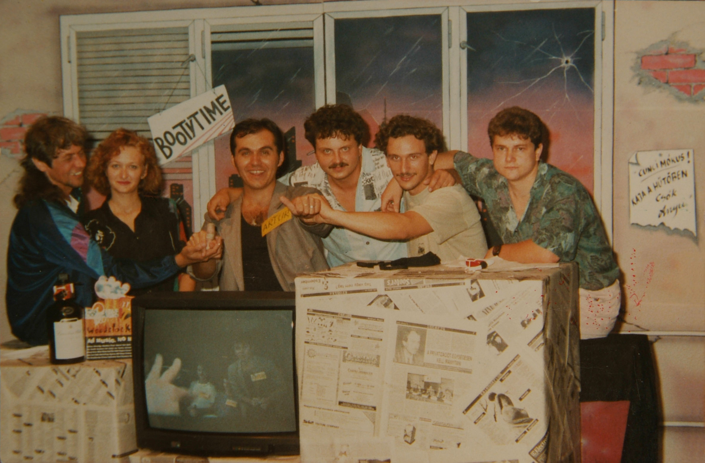 Bootyme stab